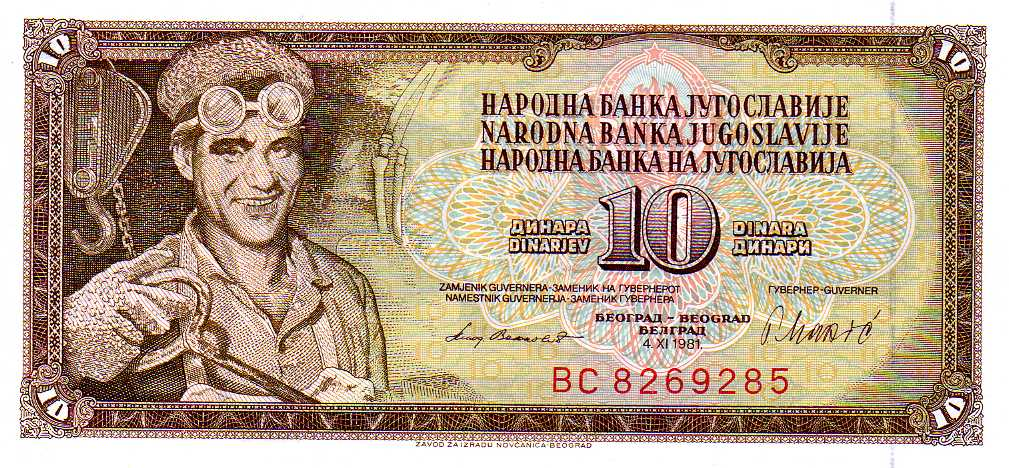 10 Yugoslav dinar (1981) - obverse